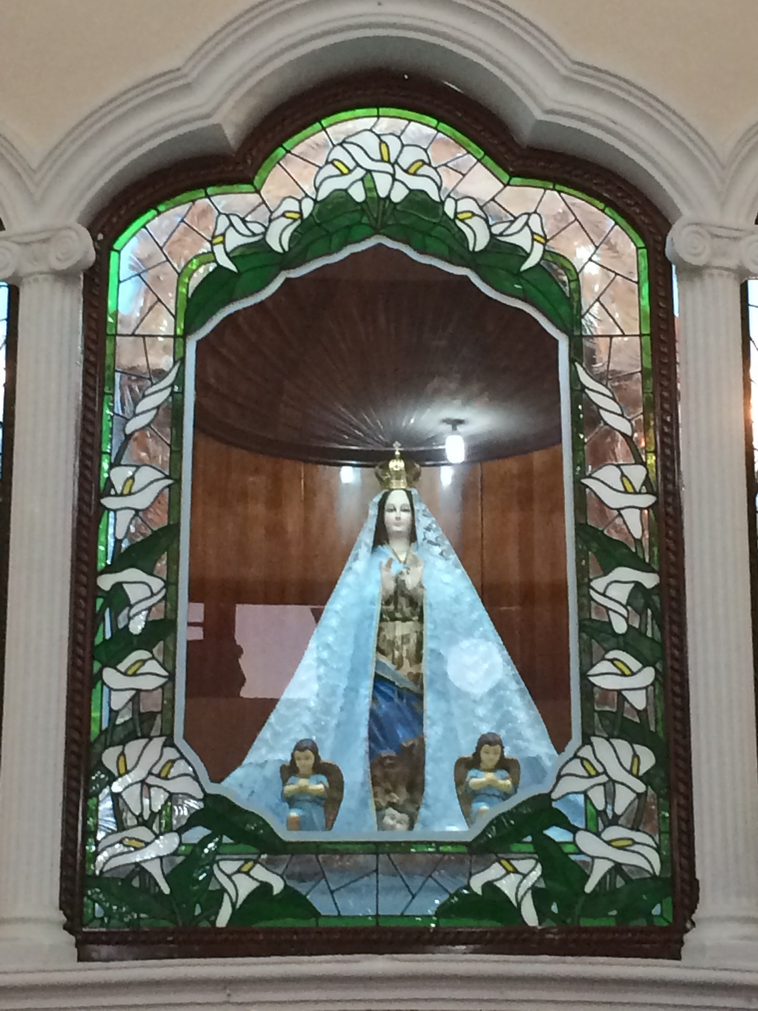 Imagen de la Virgen de la Natividad